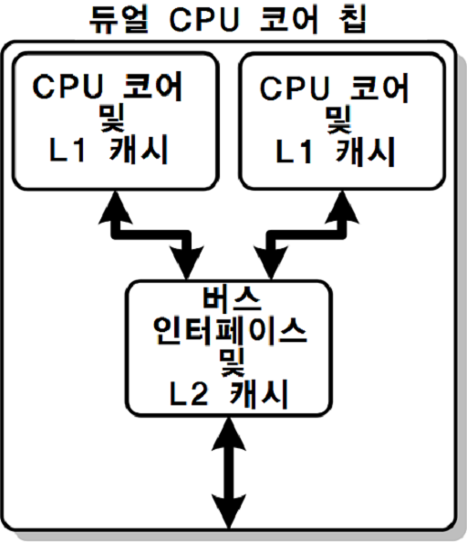 한국어로 된 듀얼 코어 도표 그림. 직접 한국어 글을 써 냄.